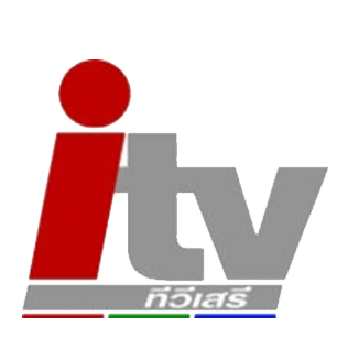 โลโก้สถานีโทรทัศน์ไอทีวี